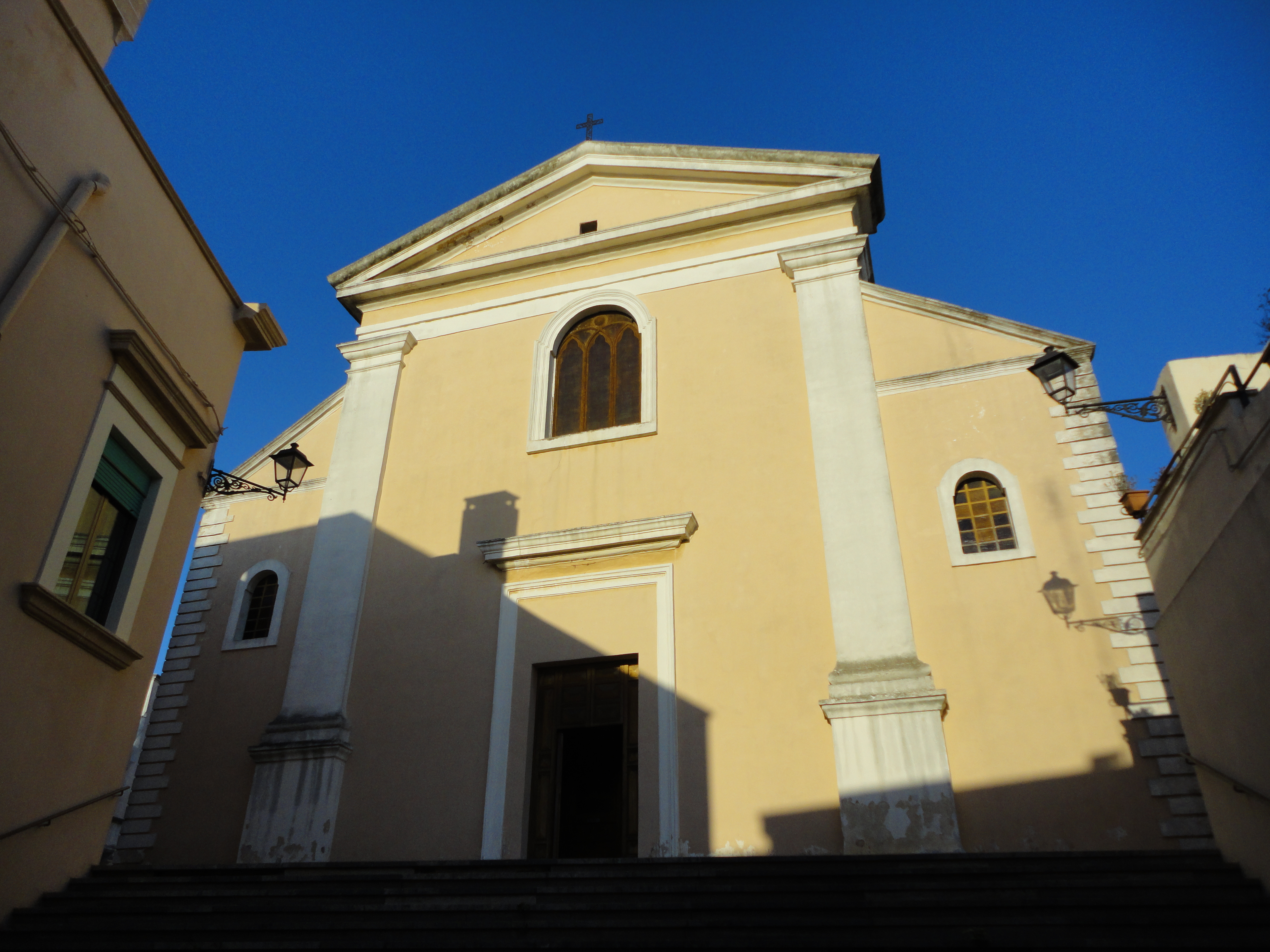 Chiesa san Giovanni Battista Parabita, Lecce